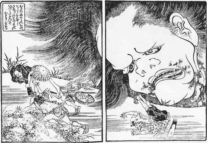 Bōro-no-kai(坊路の怪, Onryō) from Kinsei-Kaidan-Simoyonohoshi (近世怪談霜夜星)